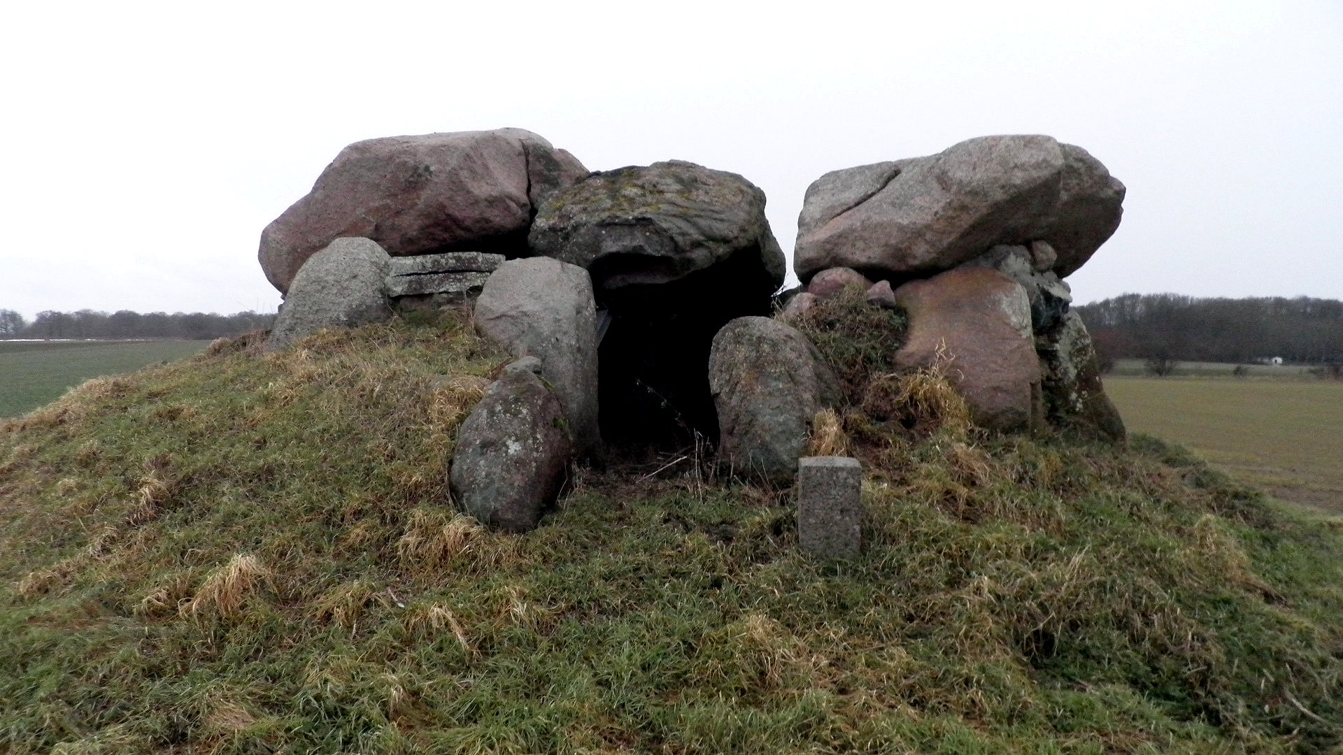 Kinderballe jættestue og rundhøj fra stenalderen, Vester Kirkemark, på Langeland i Danmark.